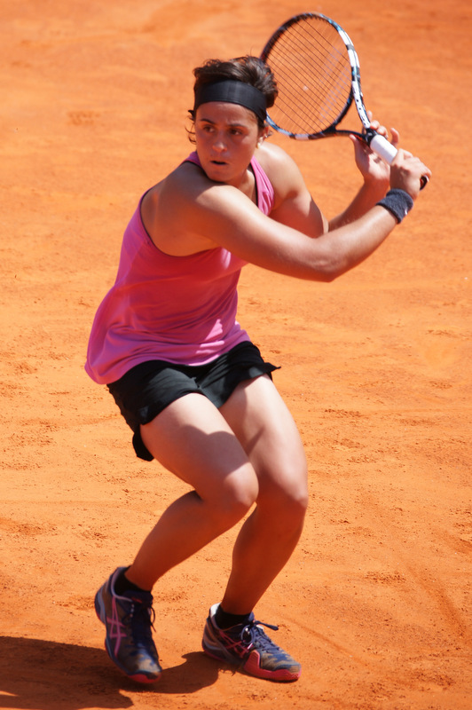 Inés Ferrer Suárez, qualification cagnes-sur-Mer 2013